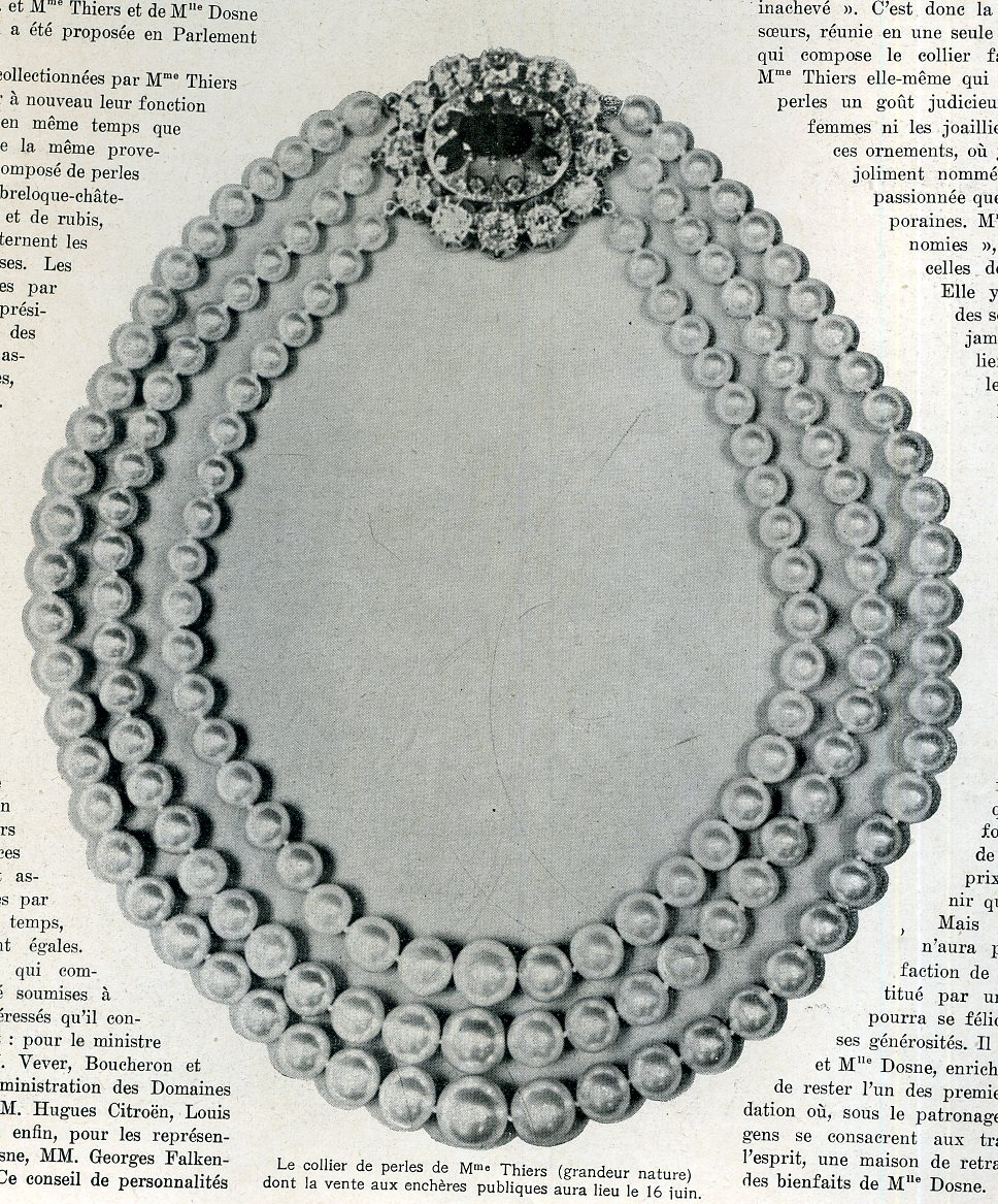 see picture -collier de Madame Thiers